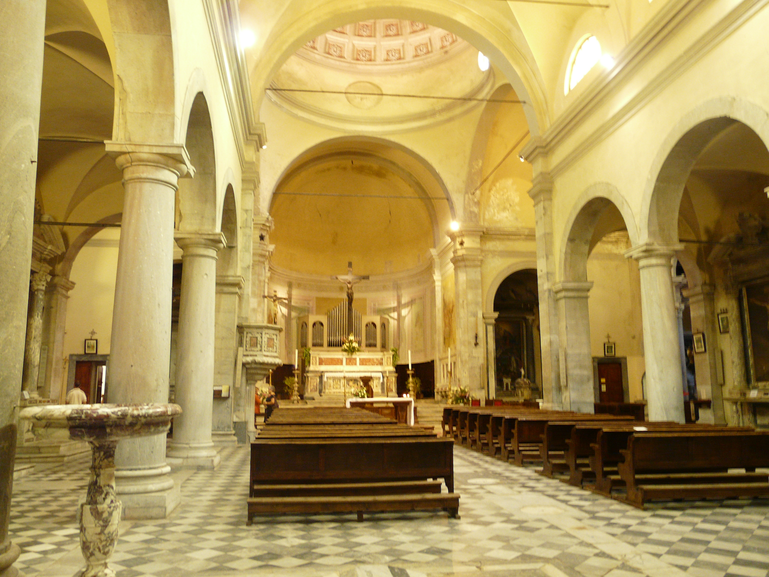 Navata della chiesa dei santi Lorenzo e Barbara, Seravezza, Toscana, Italia